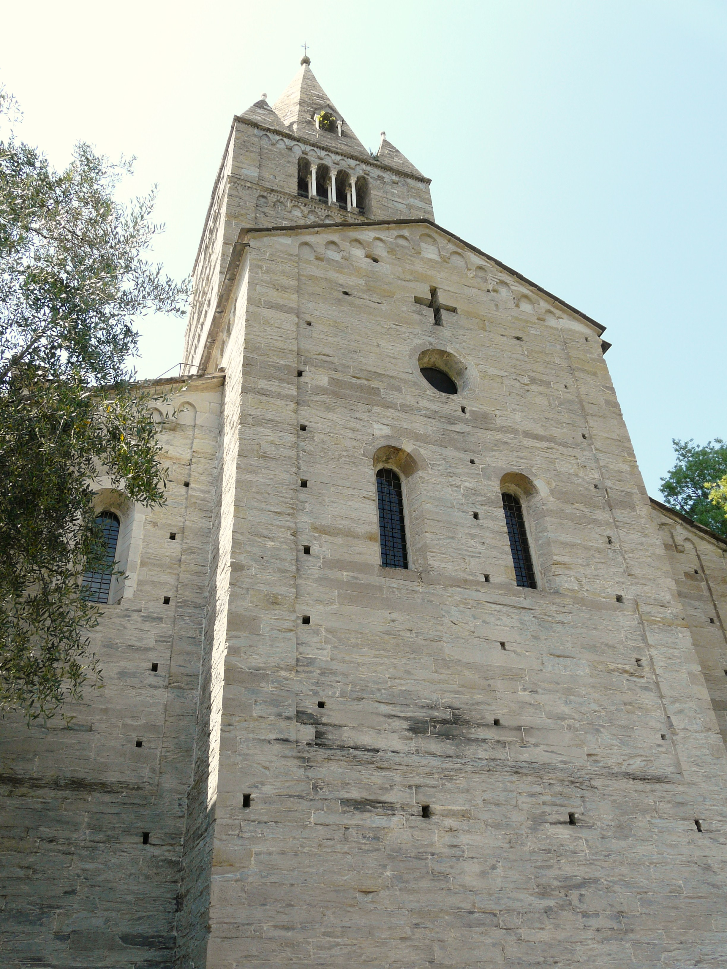 Interni ed esterni della basilica dei Fieschi presso il borgo di San Salvatore di Cogorno, Liguria, Italia Abside esterno della basilica dei Fieschi presso il borgo di San Salvatore di Cogorno, Liguria, Italia